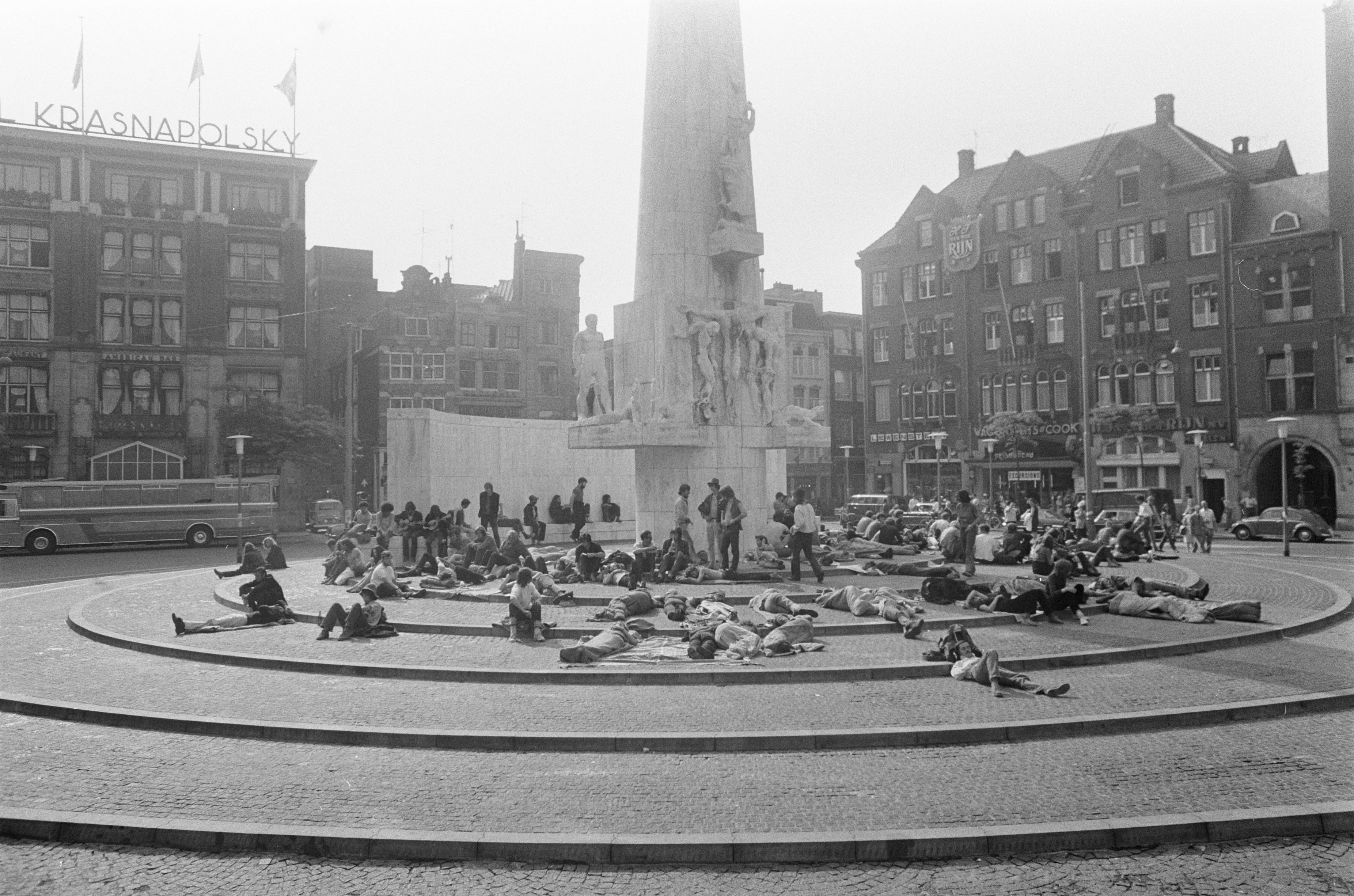 Collectie / Archief : Fotocollectie Anefo Reportage / Serie : [ onbekend ] Beschrijving : Jongelui op de Dam, Nationaal Monument, na schoonmaken Datum : 14 augustus 1969 Locatie : Amsterdam, Noord-Holland Trefwoorden : monumenten Fotograaf : Mieremet, Rob / Anefo Auteursrechthebbende : Nationaal Archief Materiaalsoort : Negatief (zwart/wit) Nummer archiefinventaris : bekijk toegang 2.24.01.05 Bestanddeelnummer : 922-7077